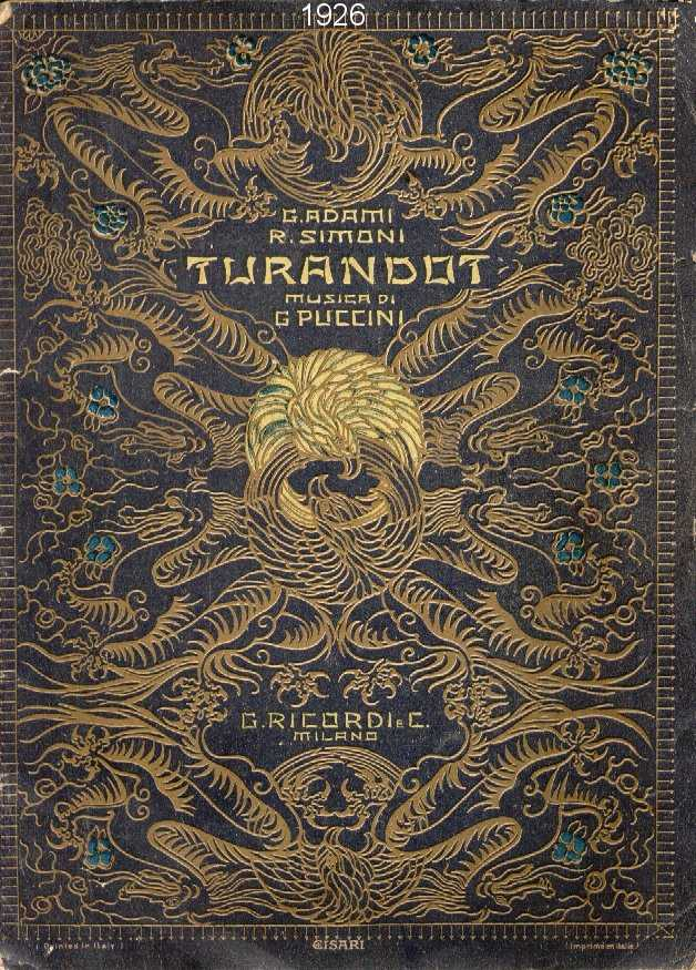 Copertina del libretto d'opera "Turandot" di G. Adami e R. Simoni musica di Giacomo Puccini - edizioni G. Ricordi & C. Milano - Prima rappresentazione alla Scala di Milano 25 aprile 1926